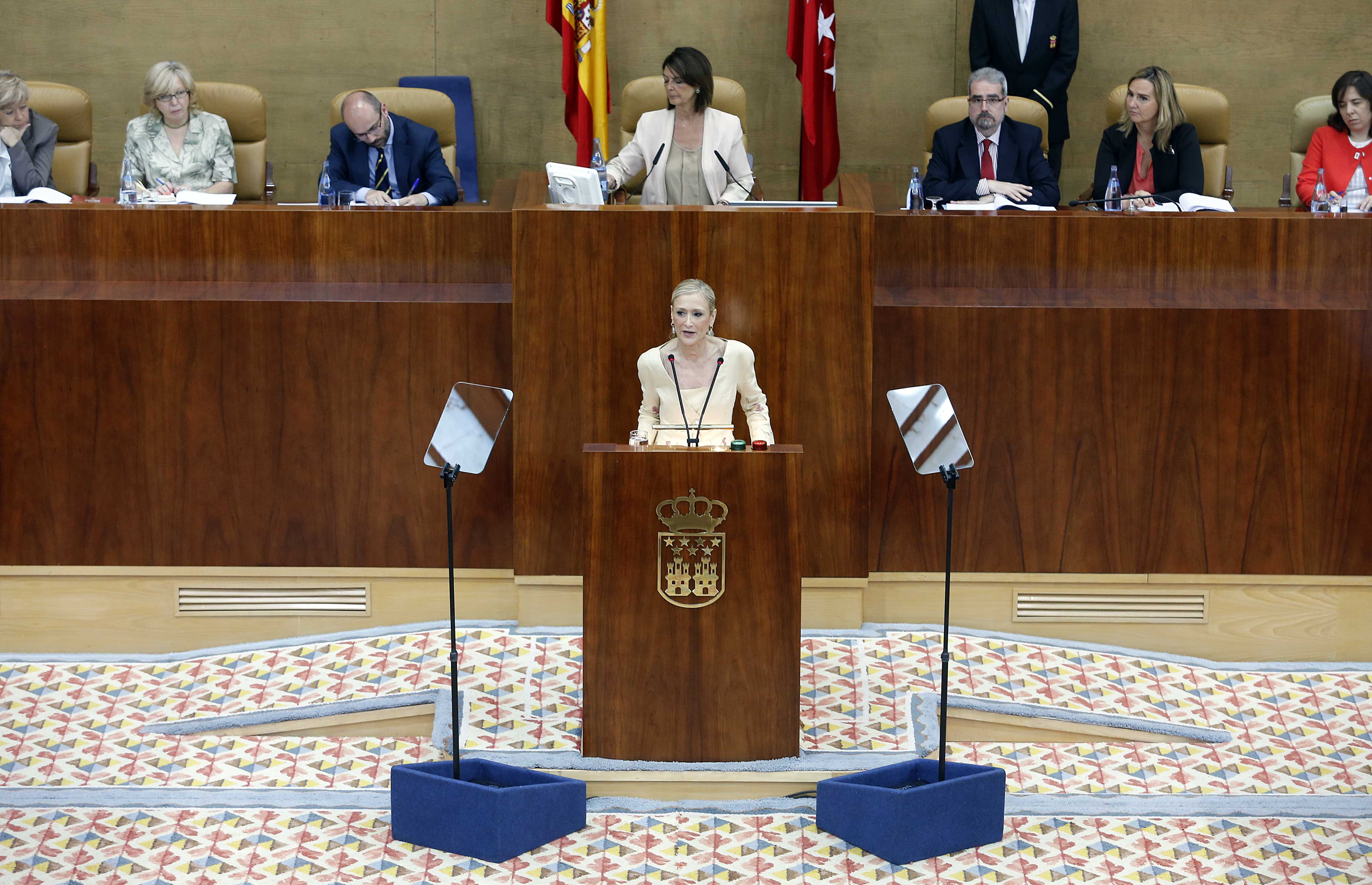 He presentado mi programa de gobierno ante la presidenta y el resto de los diputados de la Asamblea de Madrid y a quienes pido su confianza para ser mañana investida. Un programa ante todo social que busca pactos con el resto de los grupos en materias tan trascendentales como la sanidad, la educación y la regeneración democrática. Foto. D. Sinova